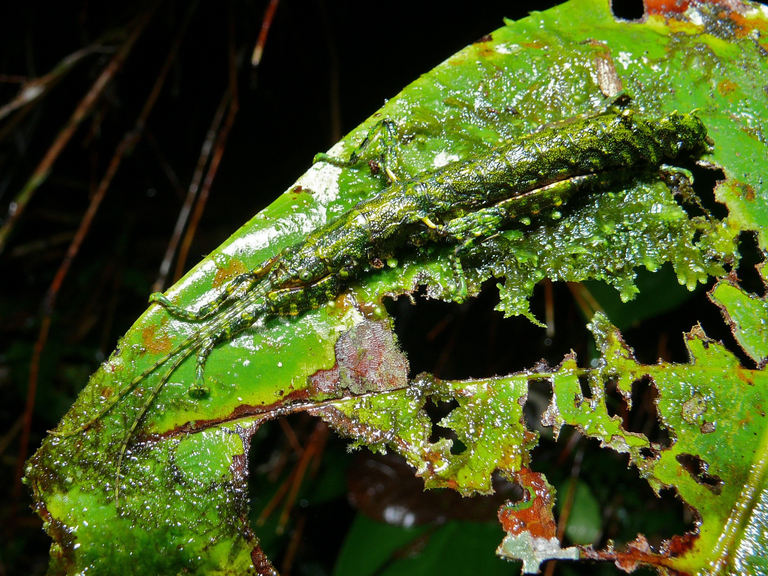 Gunung Mulu NP, Sarawak, MALAYSIA